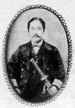 a Japanese man 榎本武揚 (Takeaki Enomoto)